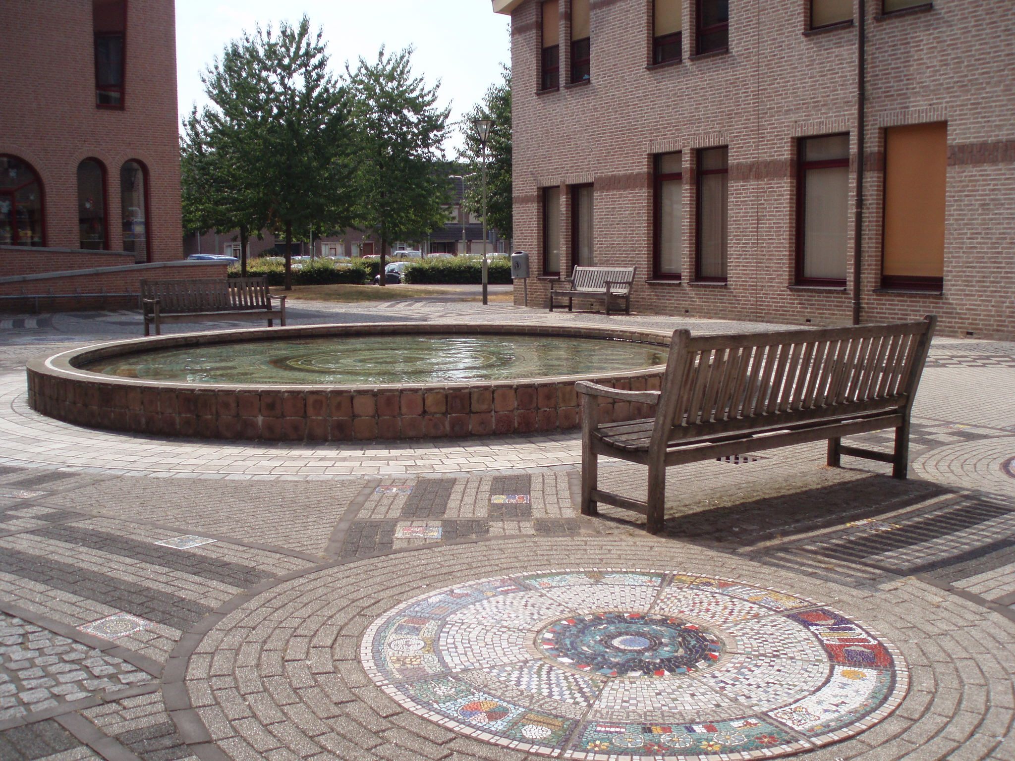 eigen foto 2006 (c) looi